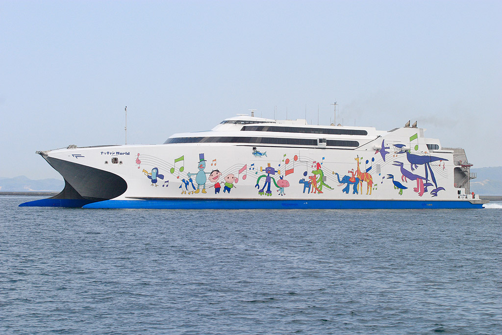 Schnellfähre 'Natchan World' im Hafen von Aomori